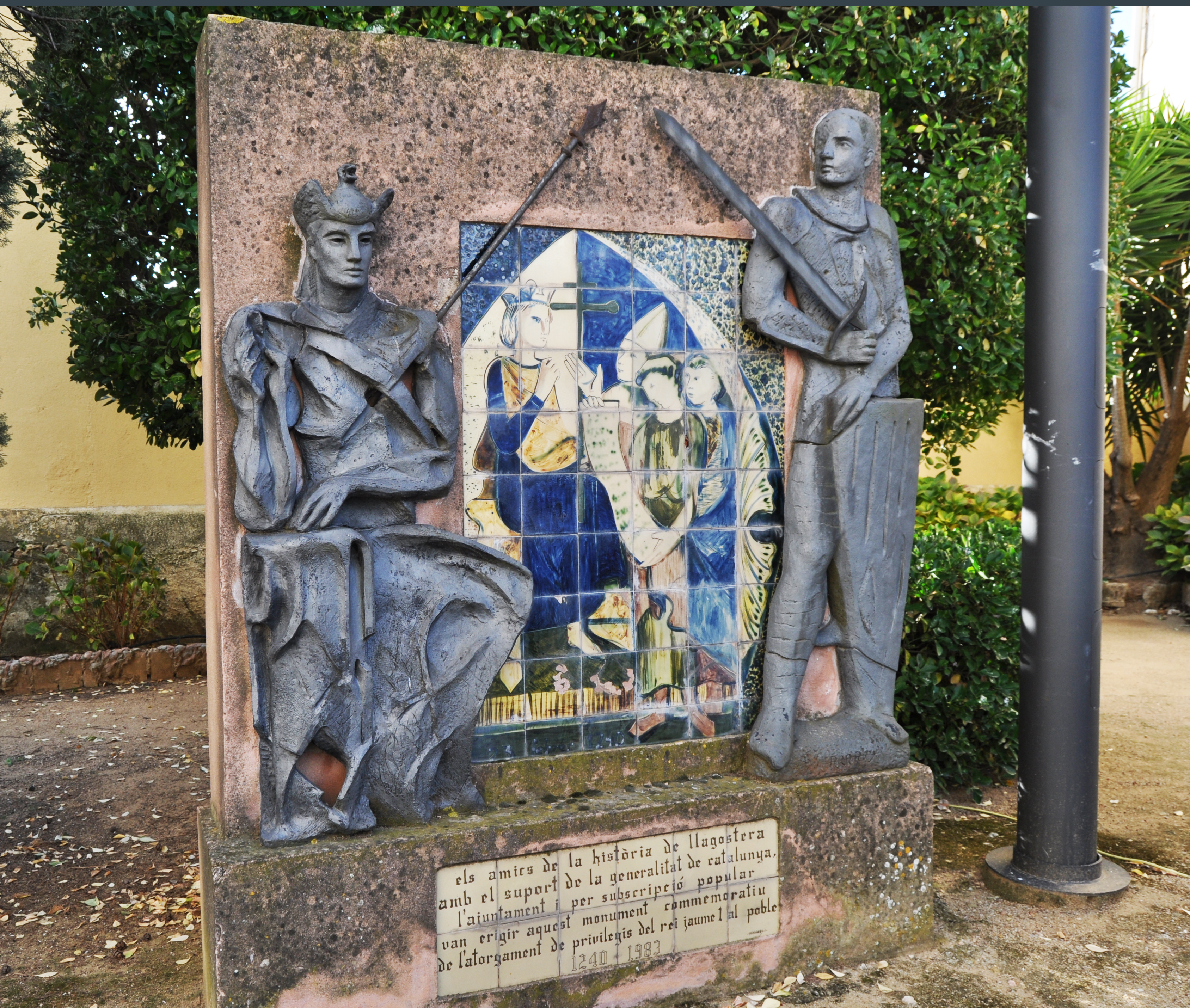 El motiu de l'escultura a Jaume I de Llagostera és l'atorgament de la Carta de Franqueses.